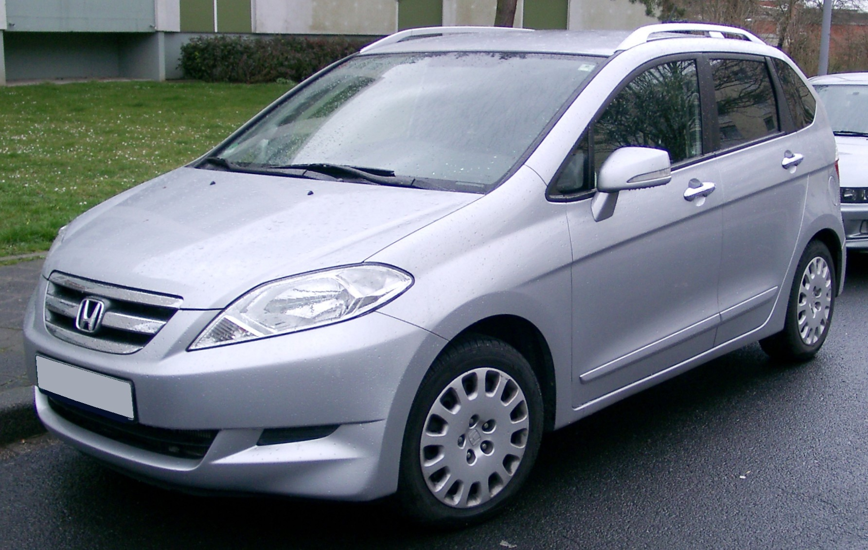 Honda FR-V